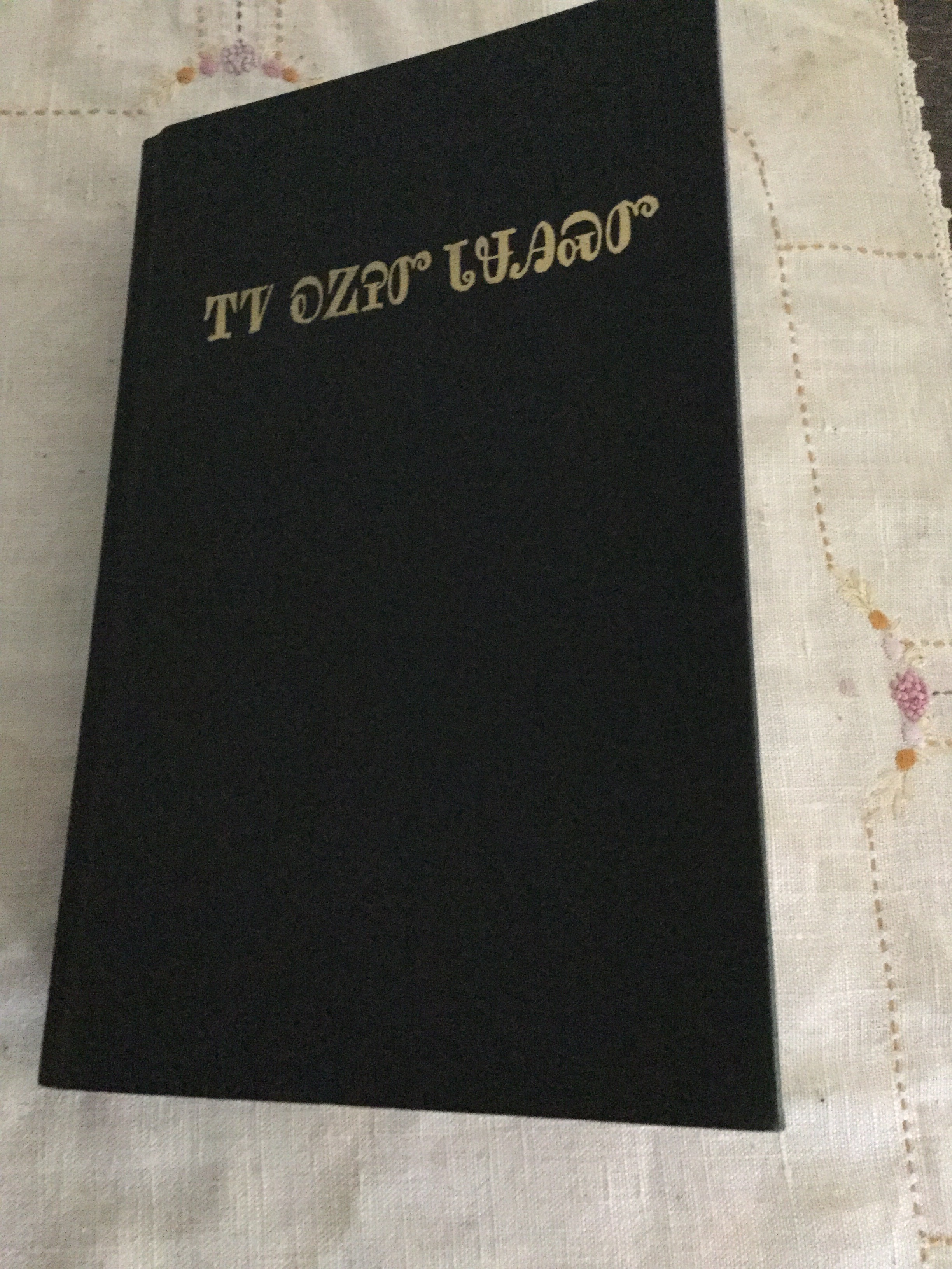 Cherokee Heritage Museum